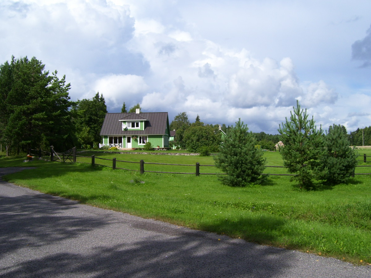 Juuriku talu, Kõlunõmme küla, Pühalepa vald